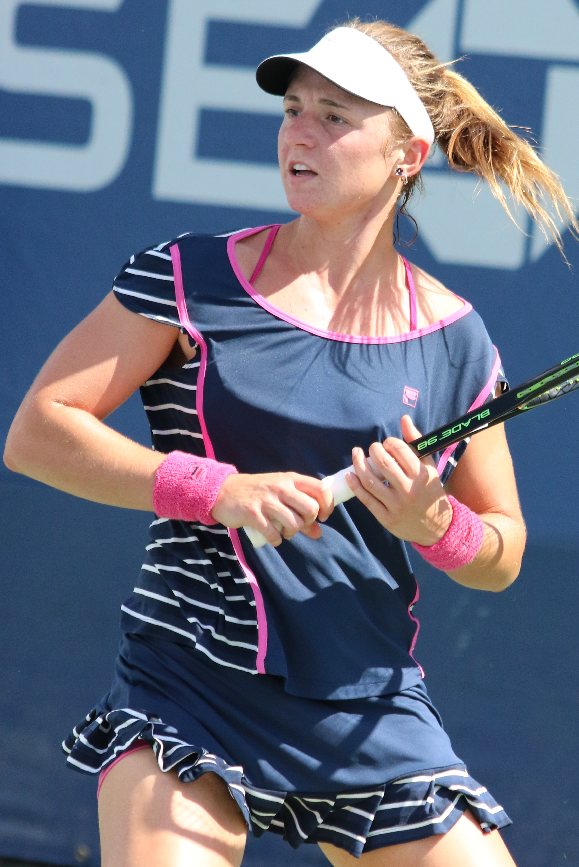 Podoroska US16 (9)